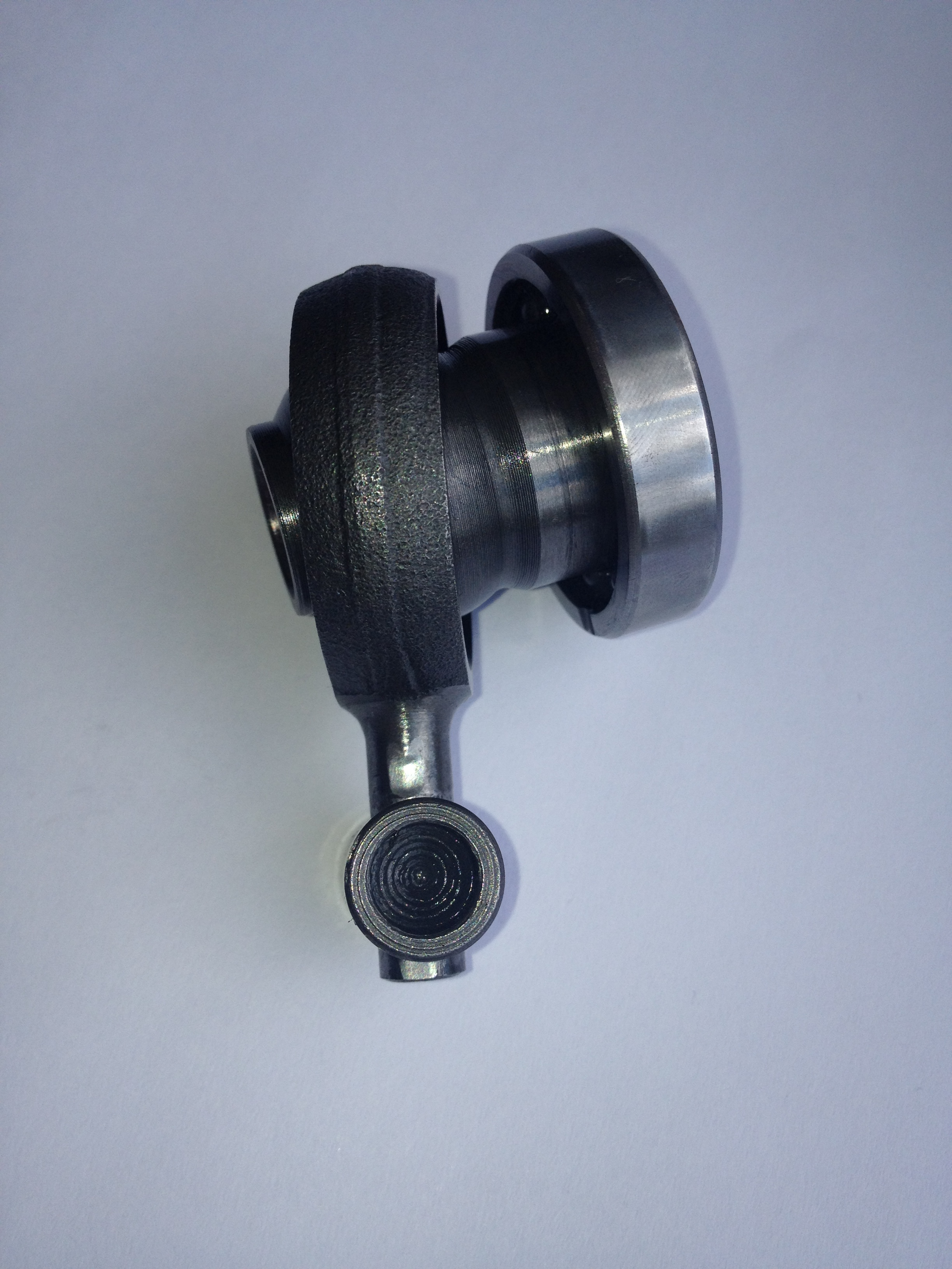 Пьяный подшипник (внизу - приводимая втулка; справа - опорный подшипник вала)